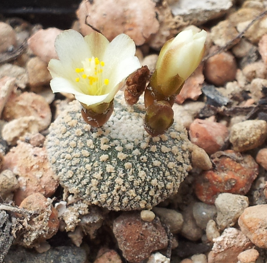 Blossfeldia liliputana in Kultur